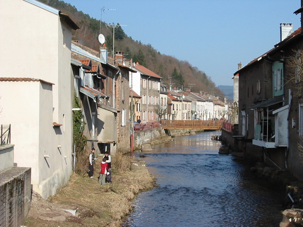 La Plaine, affluent de la Meurthe, à Raon-l'Étape. Photo personnelle du 19 mars 2006. Copyright © Christian Amet